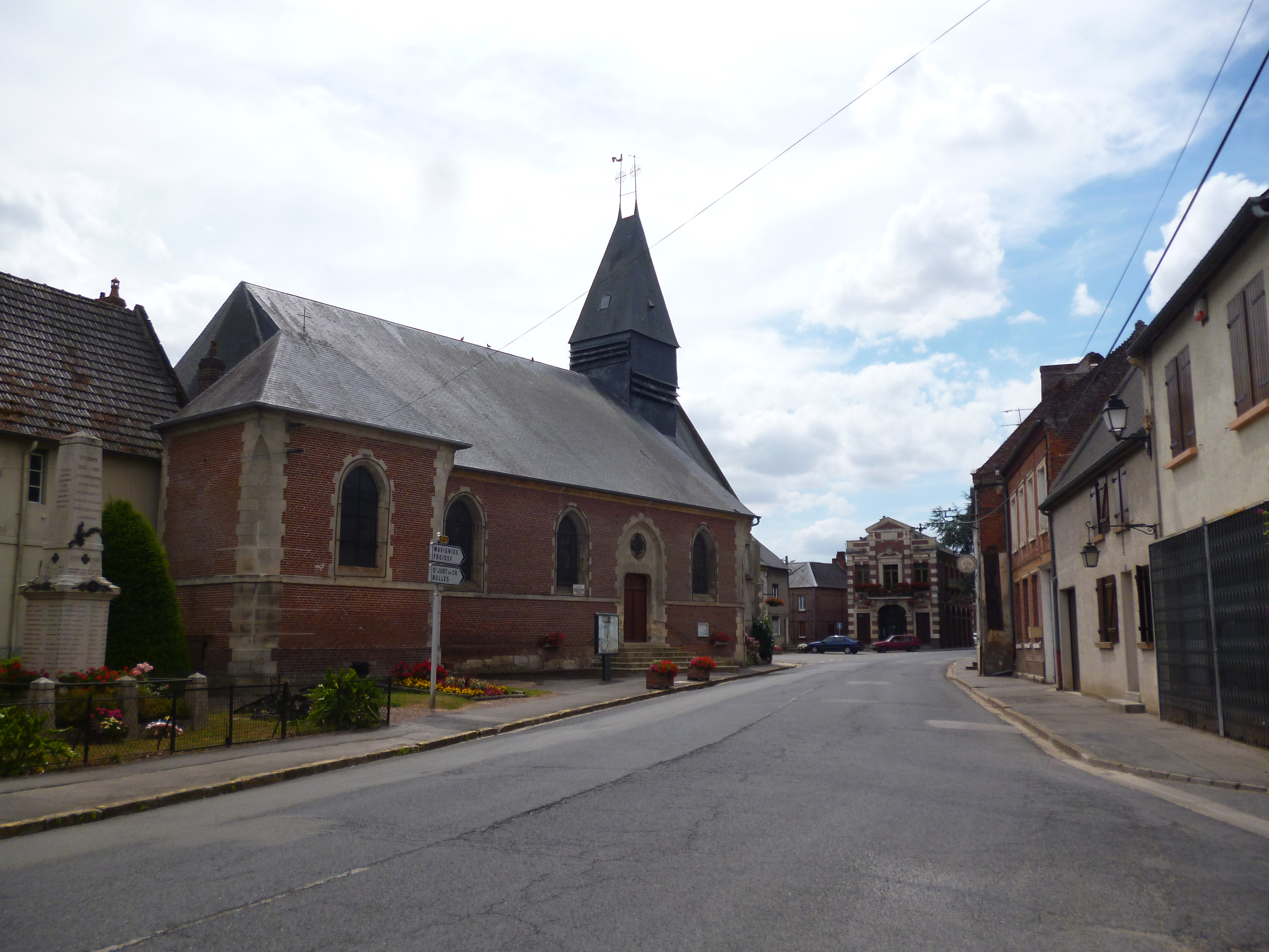 Eglise Saint-Léger et mairie d'Ansauvillers (Oise)